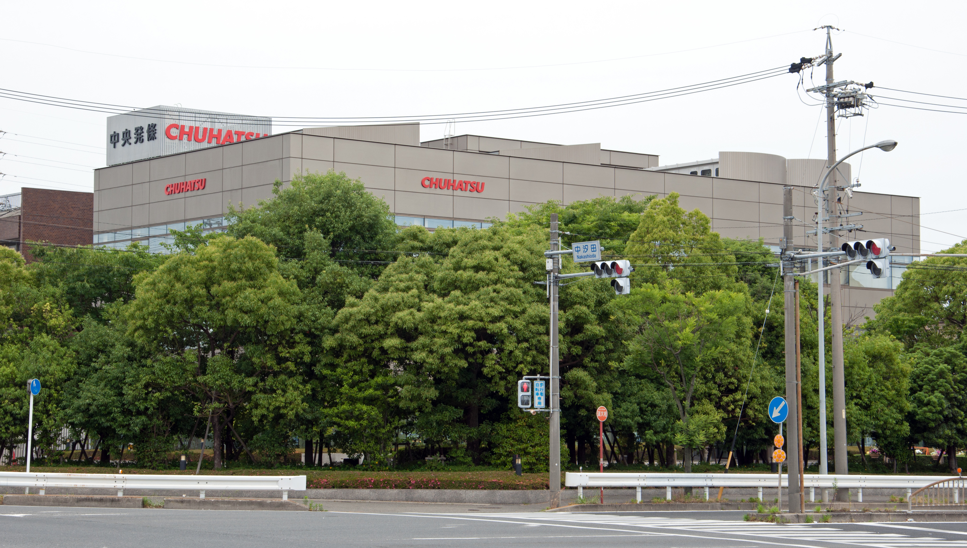 中央発條株式会社の本社